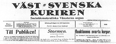 Logotyp för Väst-Svenska Kuriren (svensk dagstidning).